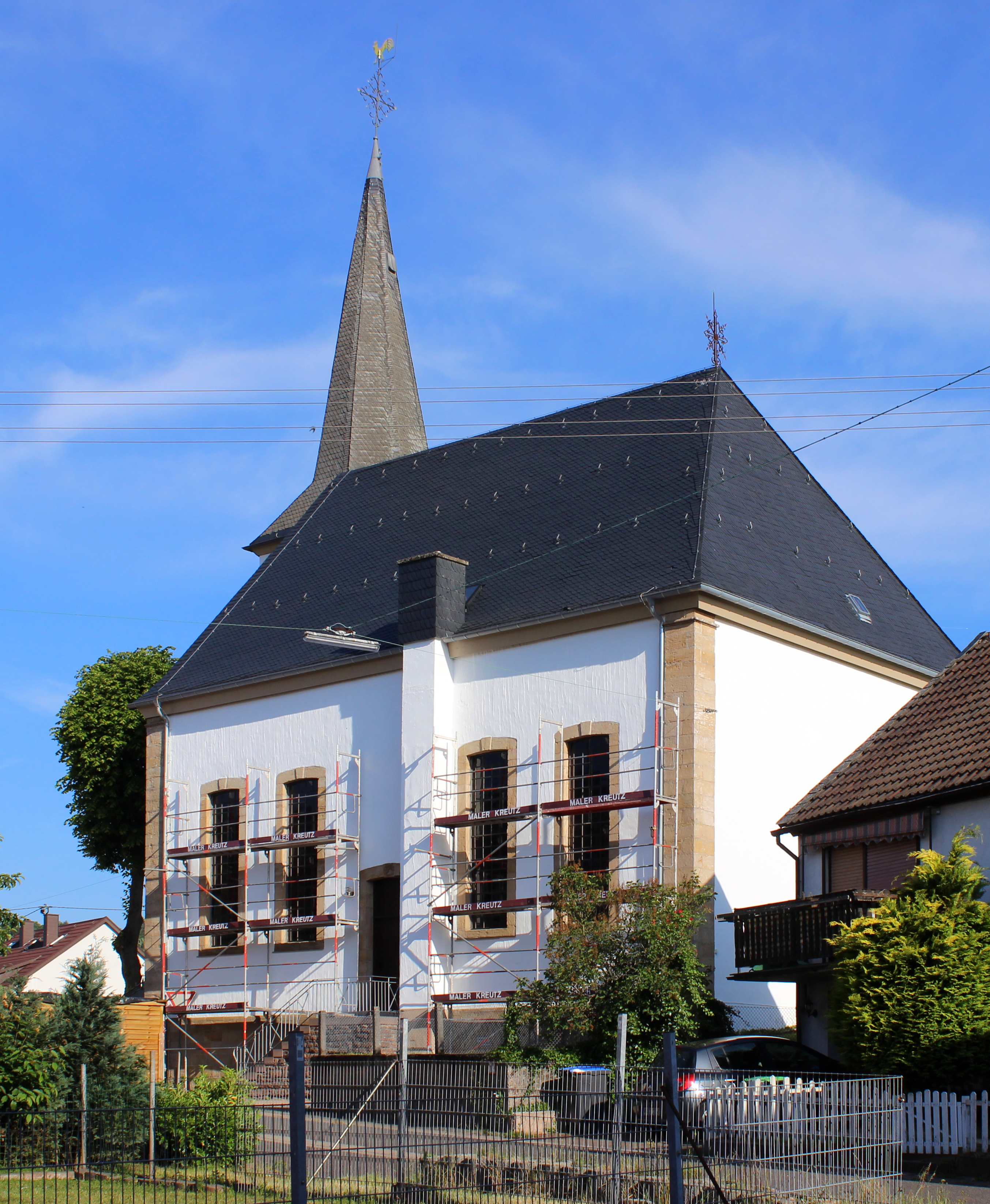 Evangelische Kirche in Sötern, Gemeinde Nohfelden, Landkreis St. Wendel, Saarland